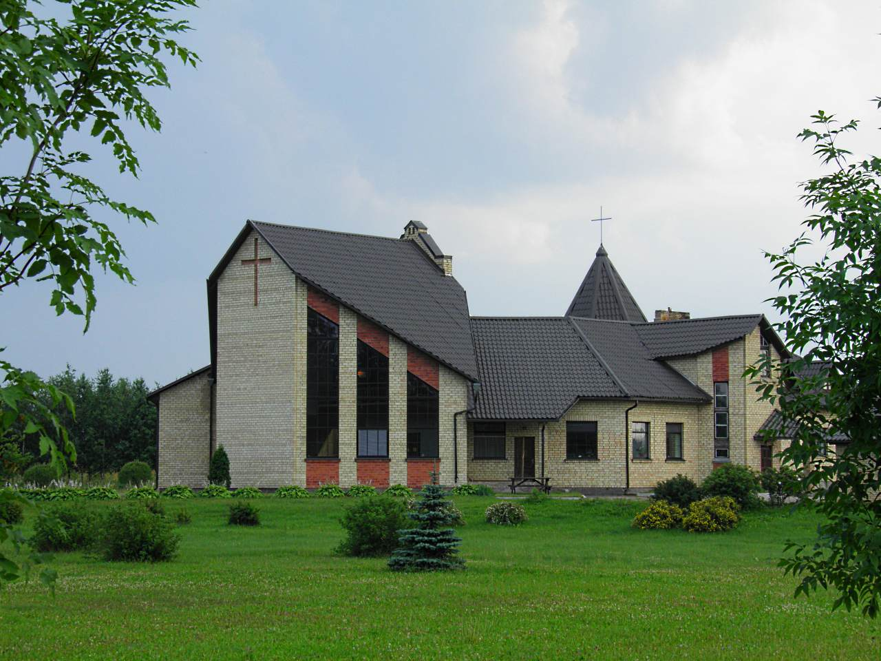 Церковь / Jaunkraukles luterāņu baznīca